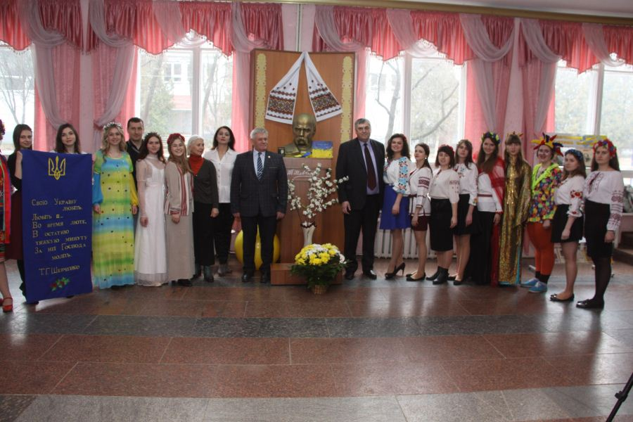 Колектив театру з наставниками